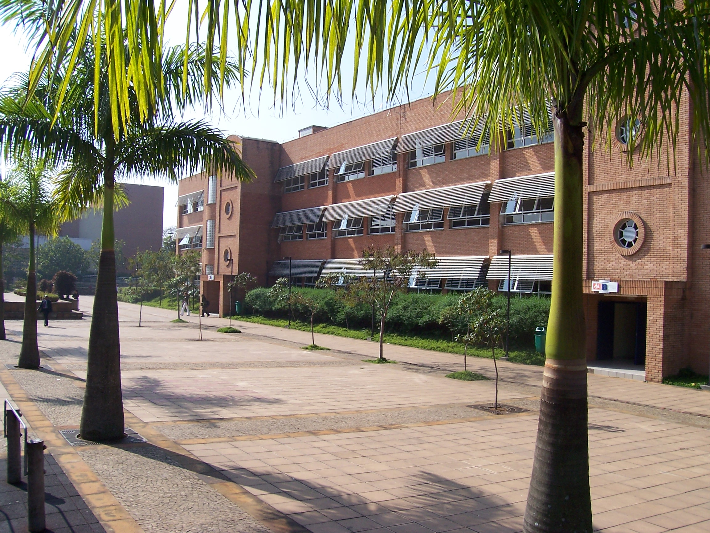 A photo from Colégio Humboldt